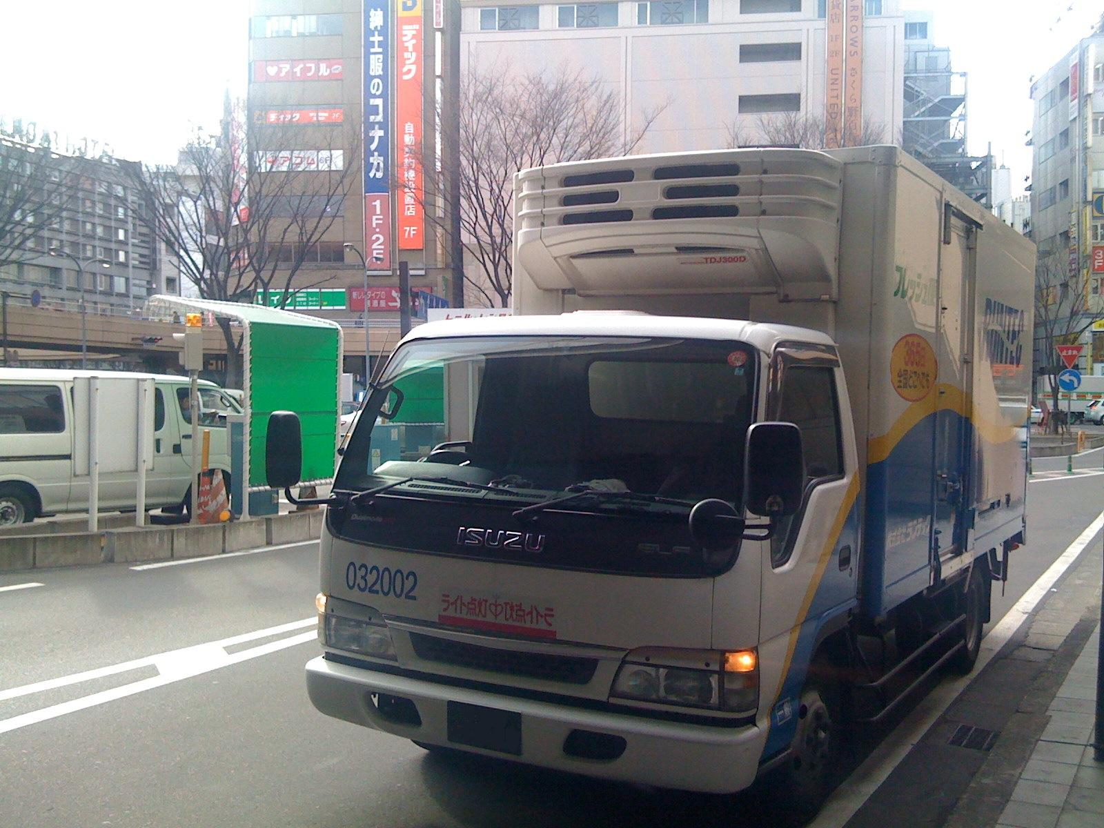 株式会社ランテックの2t 配送車